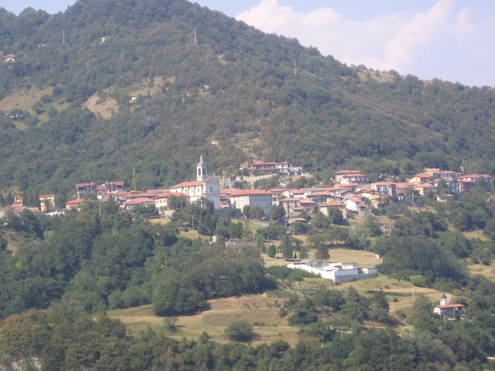 Parzanica, Bergamo, Italy